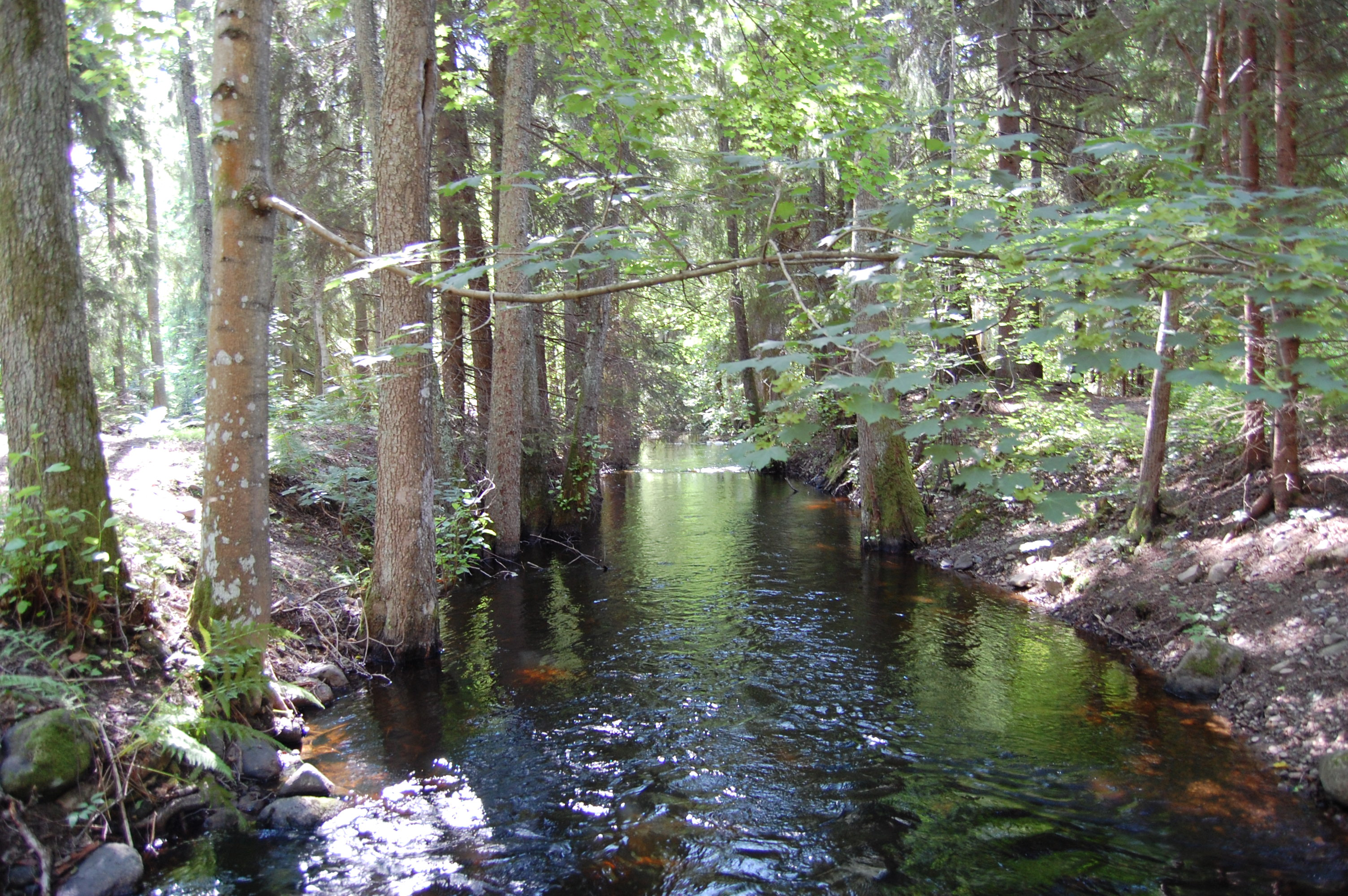 Fluss Emån bei Bodafors